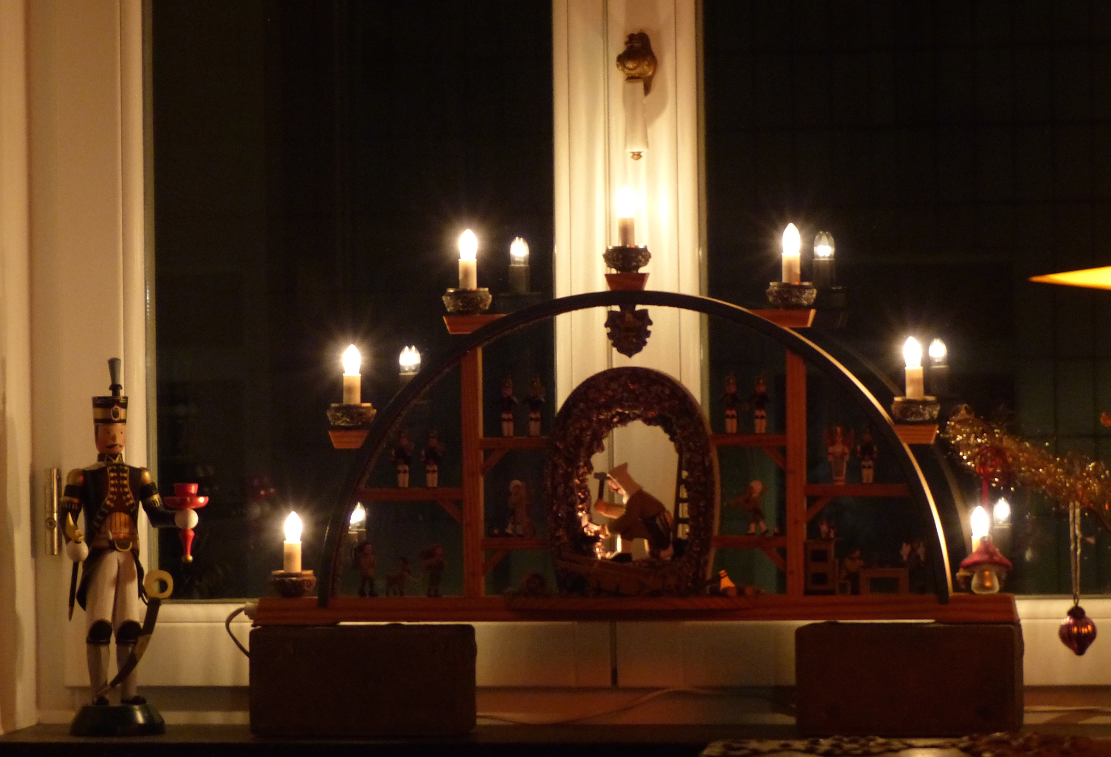 Erzgebirgischer Schwibbogen der Firma Kolbe und Bergmann am Abend